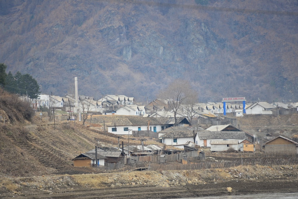 慈江道中江郡乾下里